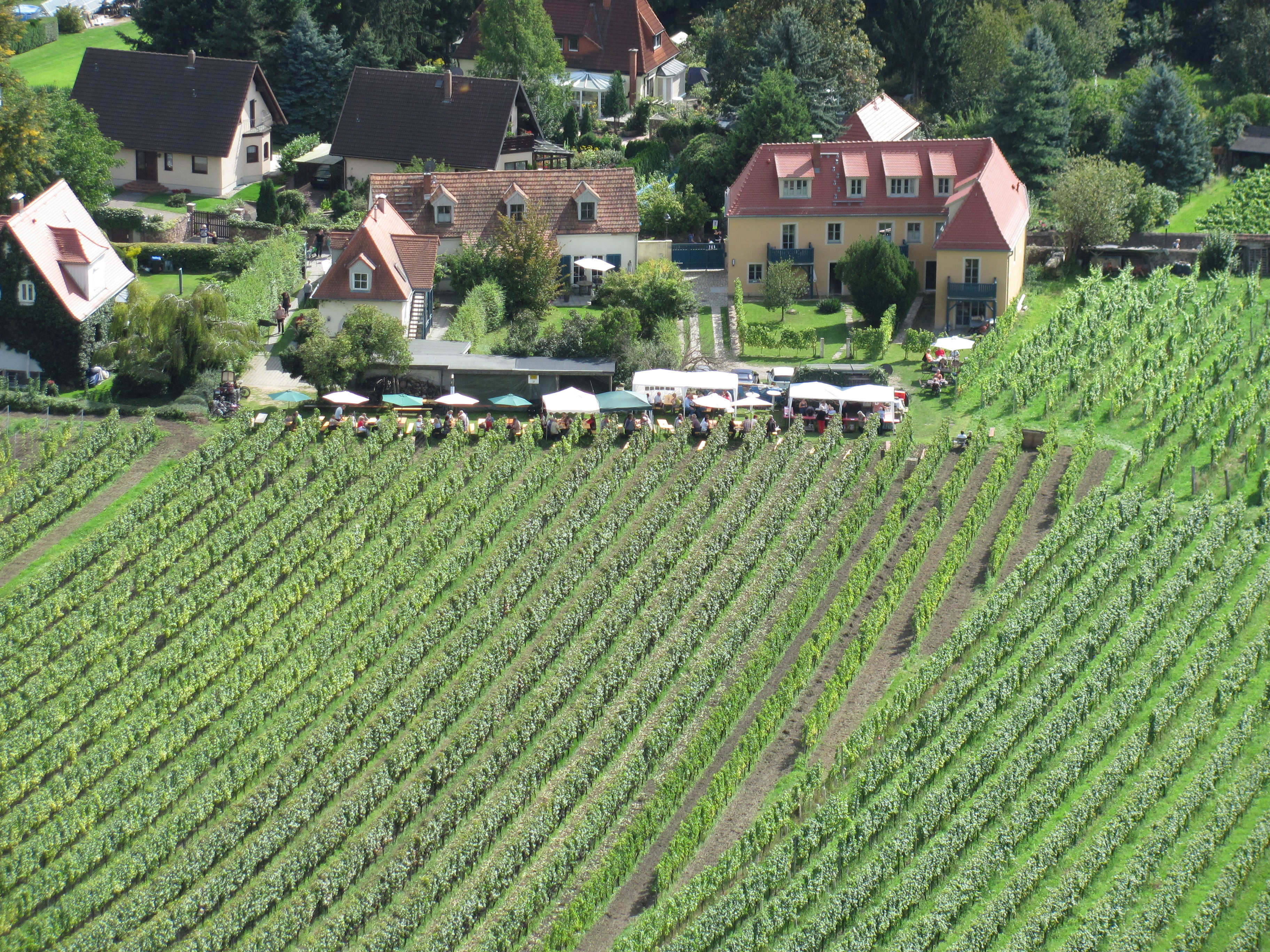 Radebeul-Oberlößnitz, Winzerhaus Barth, vom am Hang gelegenen Eggersweg aus, am Tag des offenen Weinguts 2014